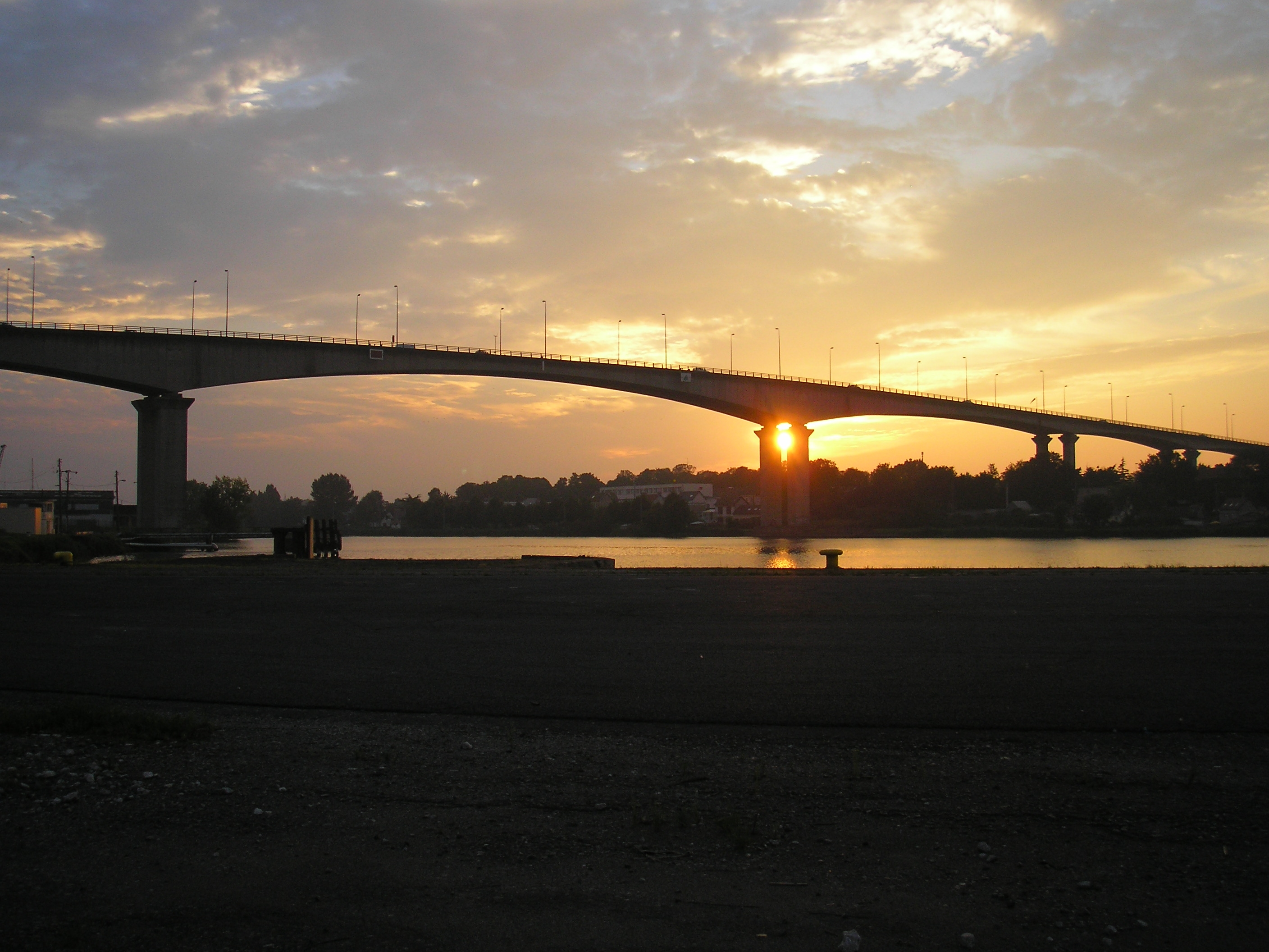 Le soleil couchant sur le viaduc de Calix entre les communes de Mondeville et Hérouville-Saint-Clair, dans l'agglomération caennaise (Normandie, France). Il enjambe l'Orne et le canal de Caen à la mer.